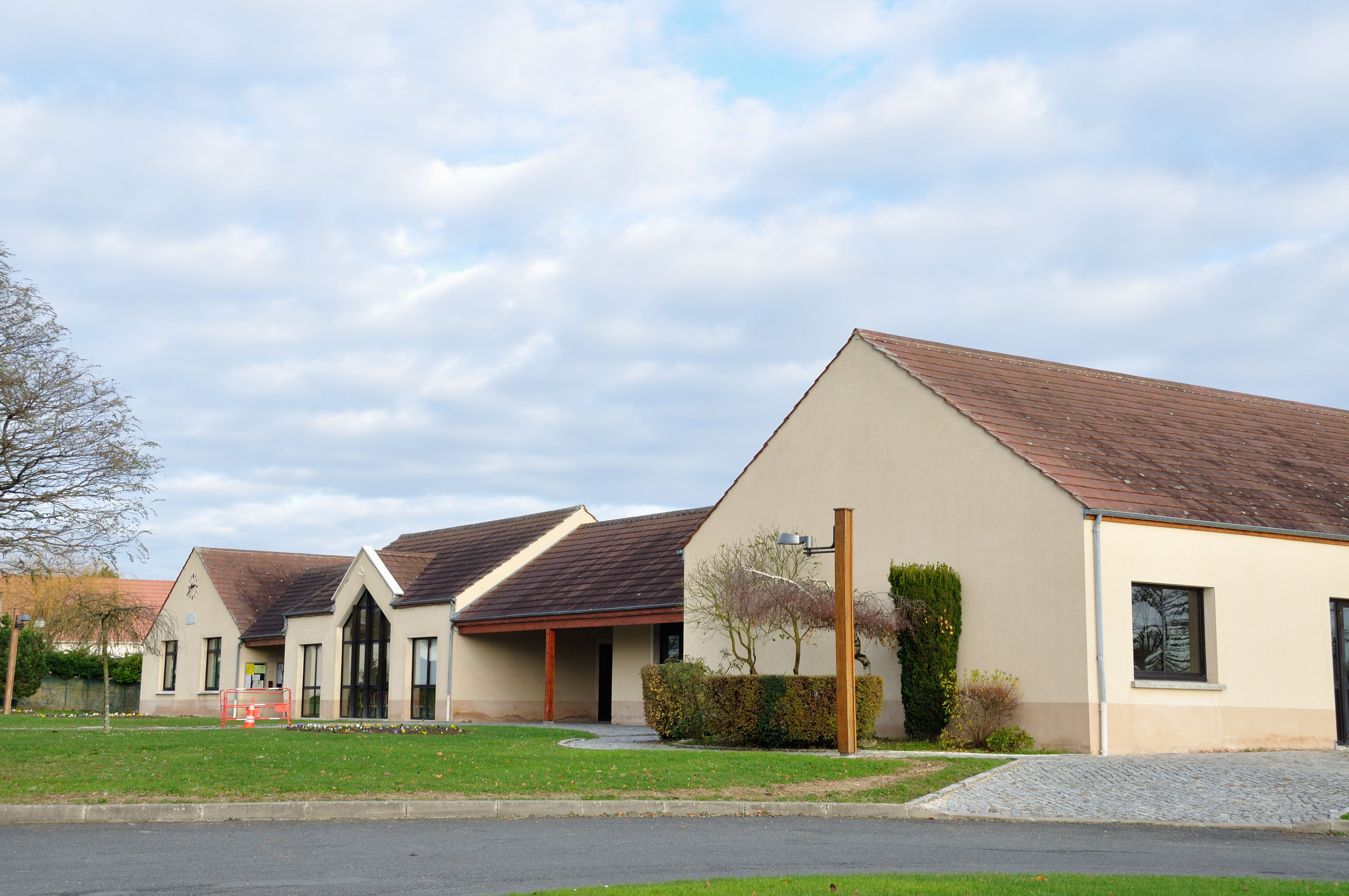 Mairie de Chauffry depuis 1993 et salle des fêtes. (département de la Seine-et-Marne, région Île-de-France).